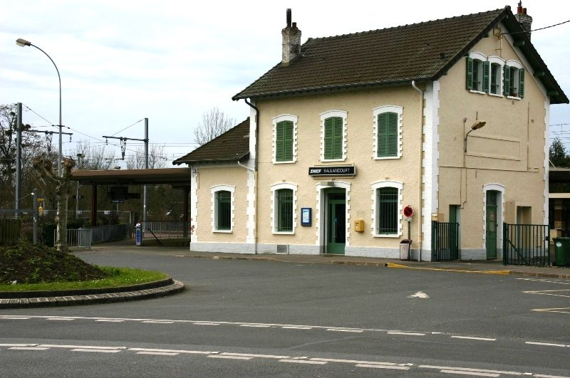 Gare de Ballancourt. Le batiment voyageurs.